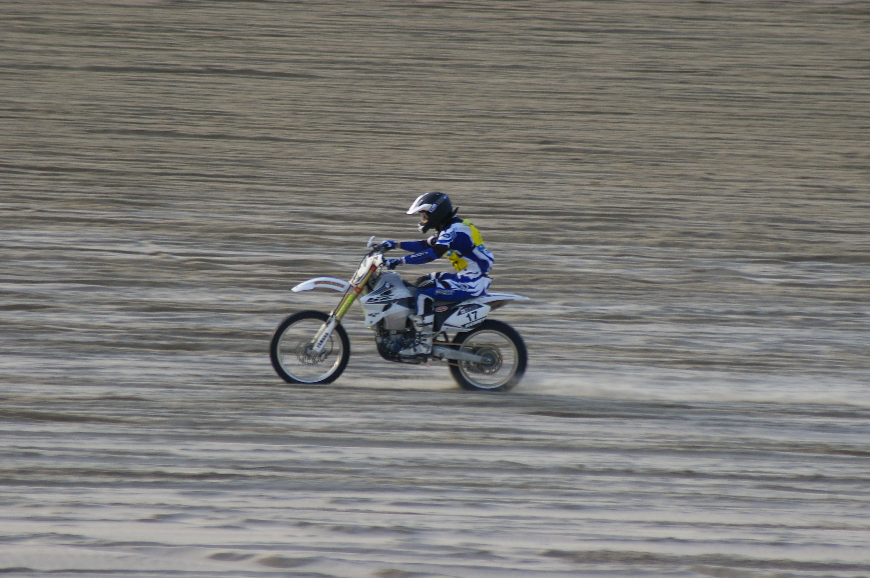 Enduropale, Le Touquet (2008)